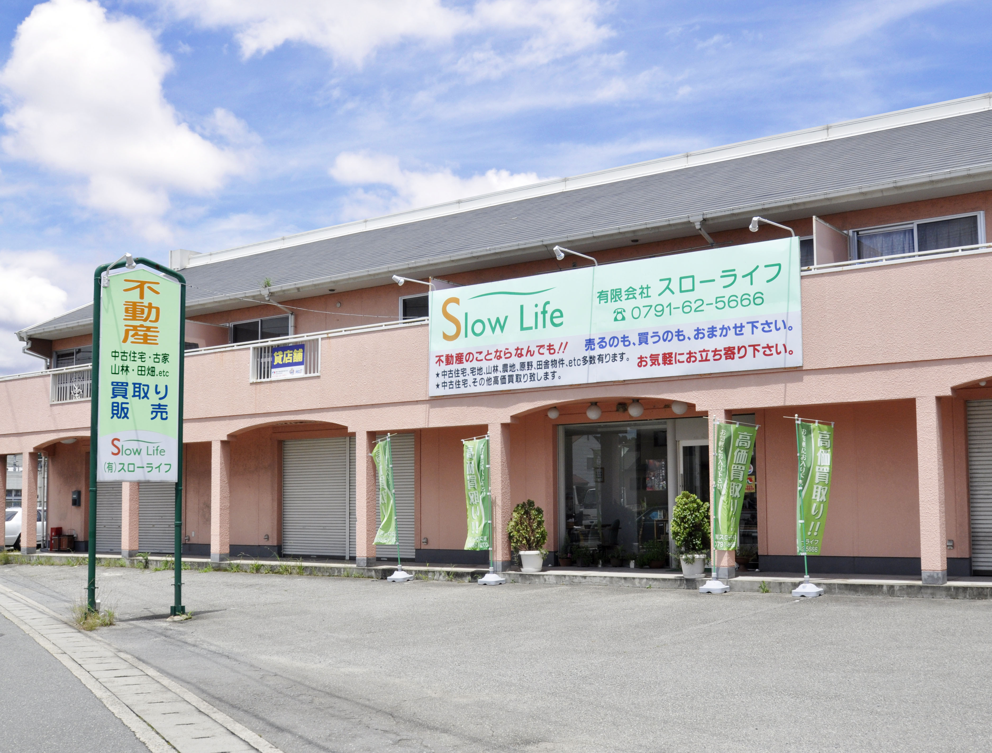 SlowLife-head office 有限会社スローライフ本店